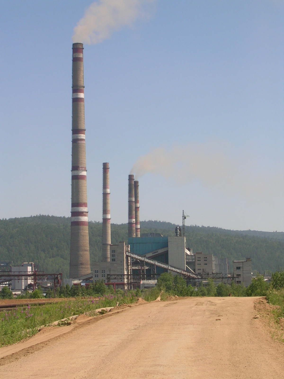 Красноярская ГРЭС-2. Общий вид